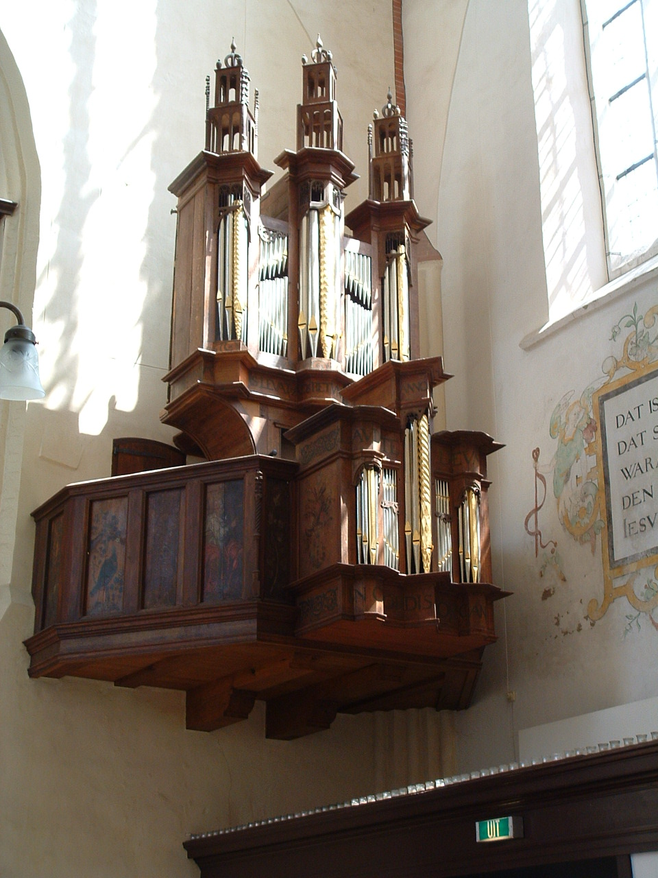 Het "Bolswarder" orgel van de der Aakerk in Groningen. Gemaakt door: J.M. Kuiper